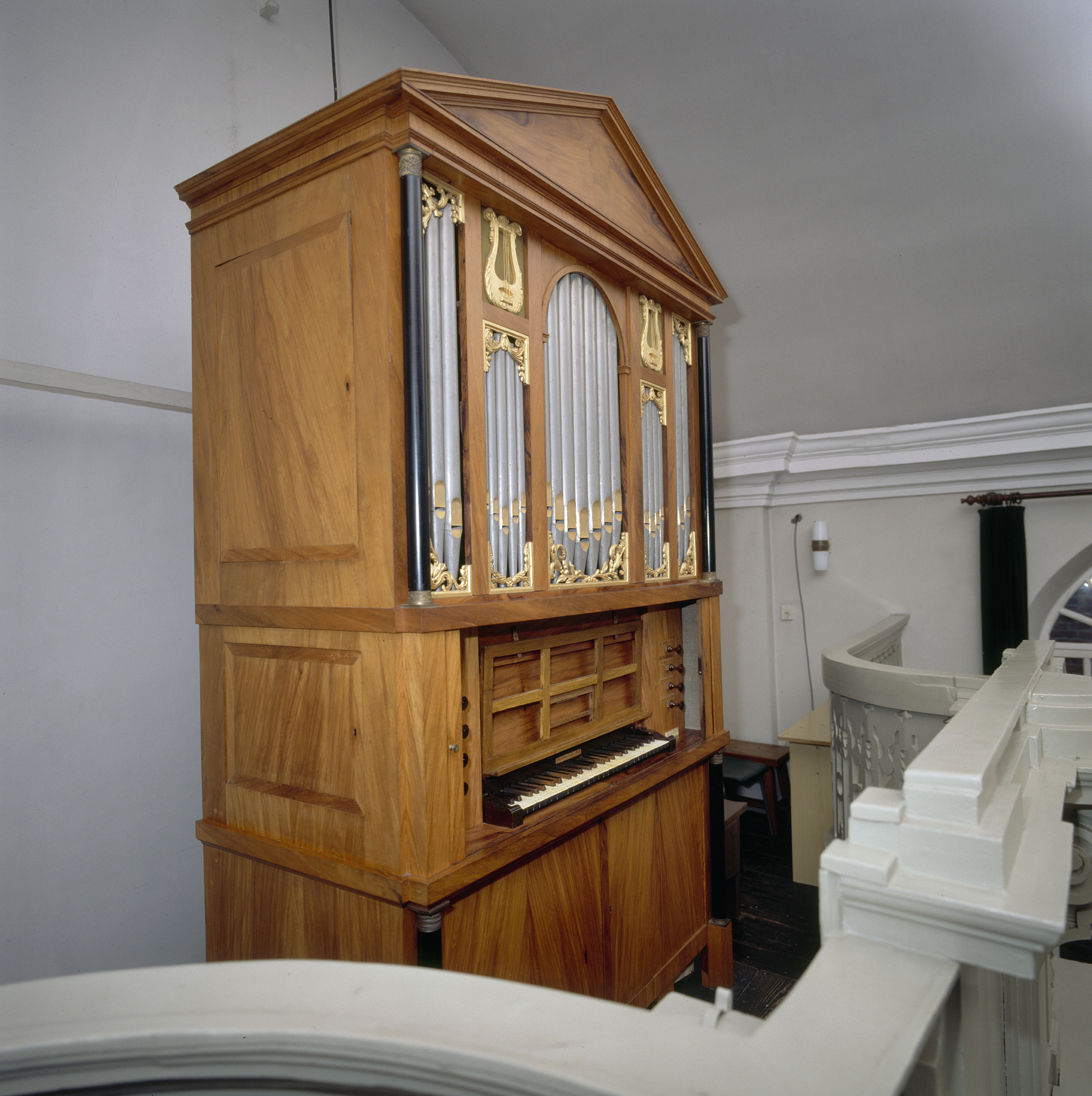 Nederlands Hervormde Kerk: Interieur, aanzicht kabinetorgel, orgelnummer 180 (opmerking: Gefotografeerd voor Het Historische Orgel in Nederland 1819-1840, bladzijde 153)